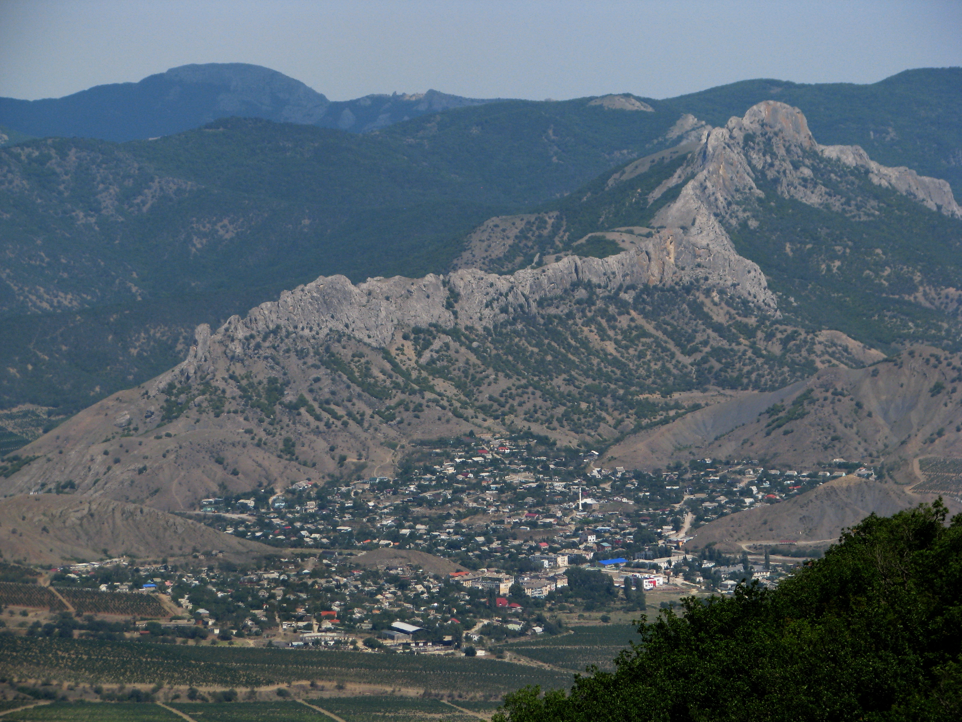 Дачное (Таракташ) с горы Перчем